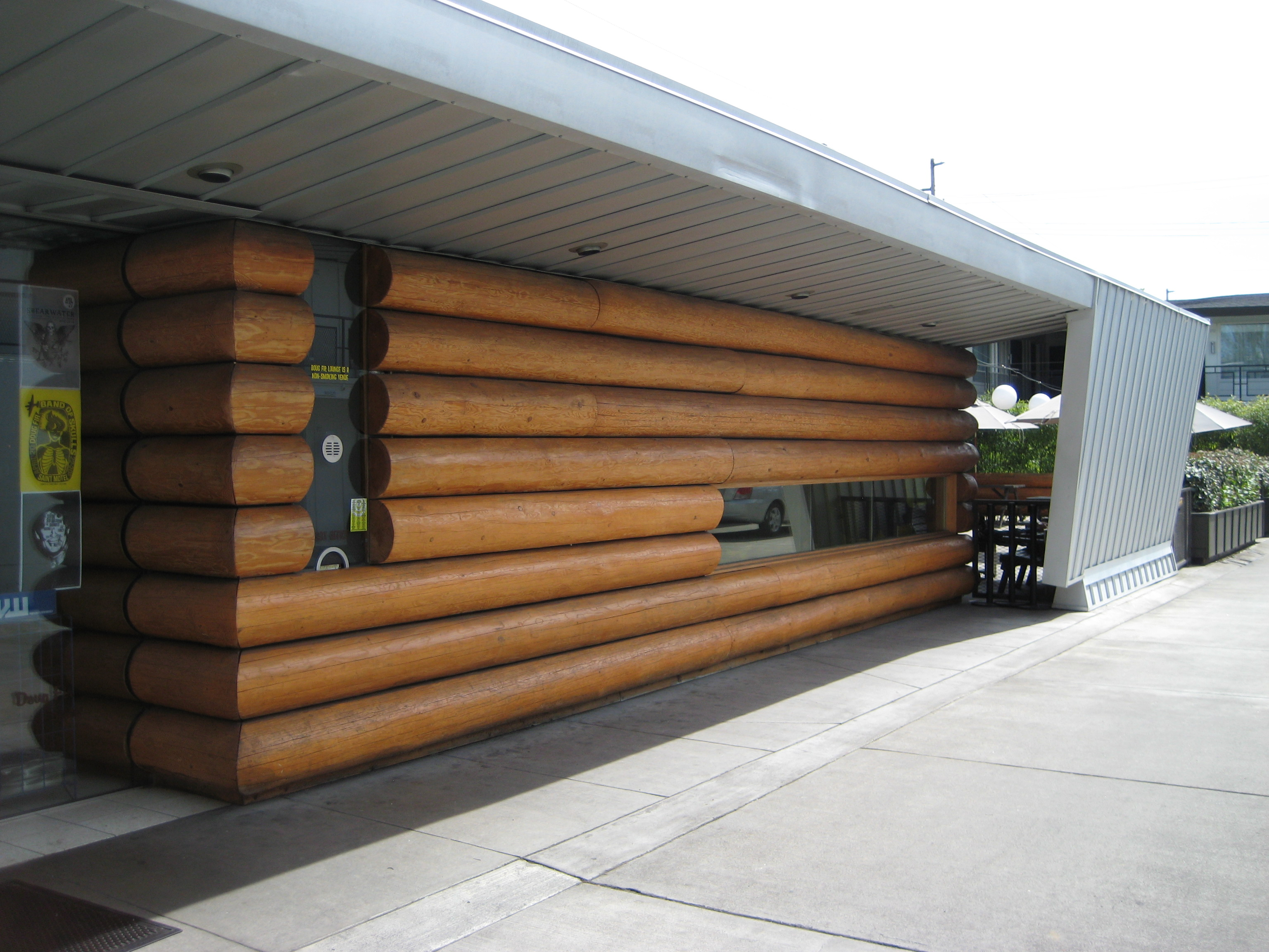 Doug Fir Lounge in Portland, Oregon